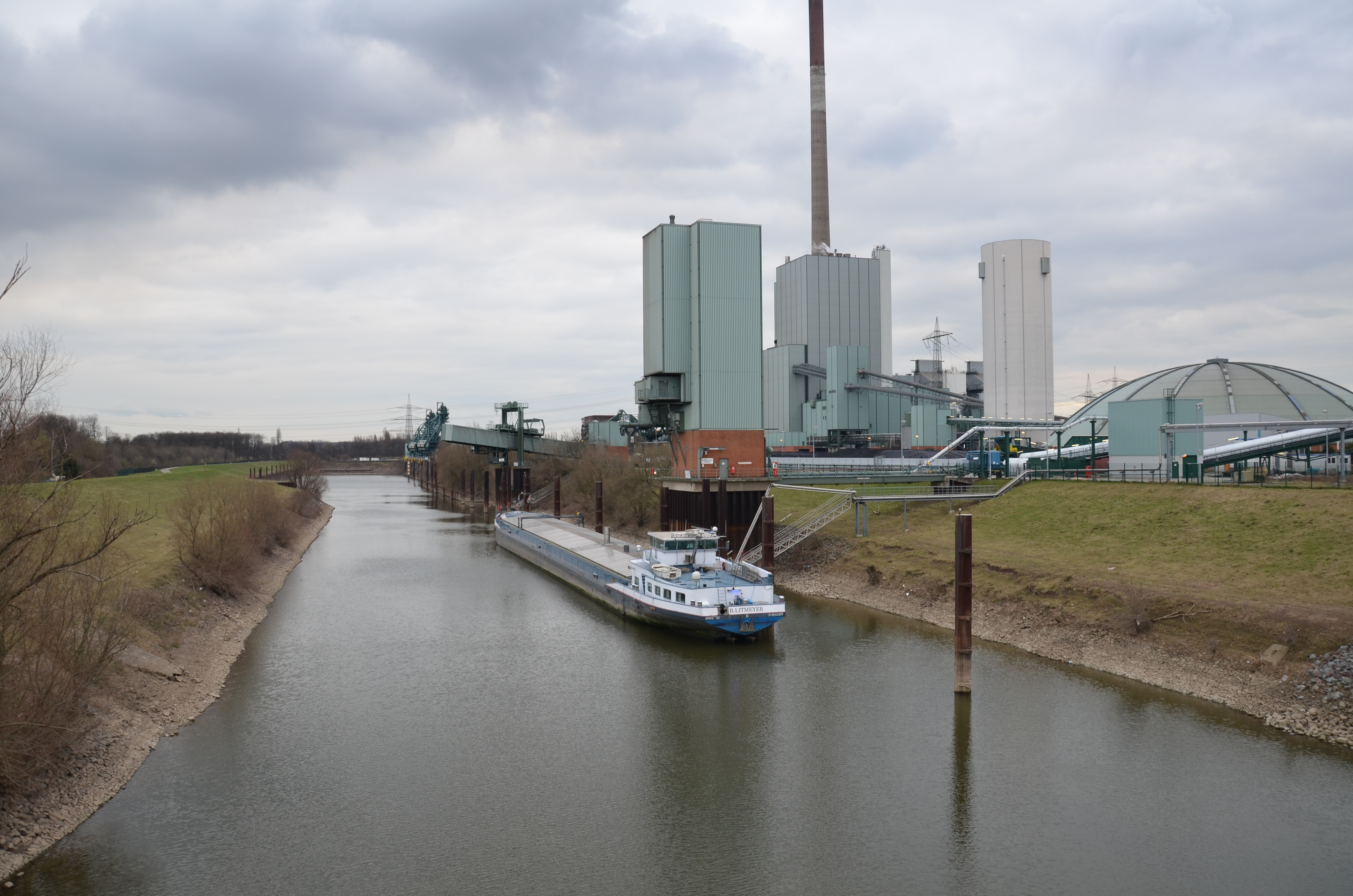 Nordhafen Walsum Hafenbecken, Kraftwerk